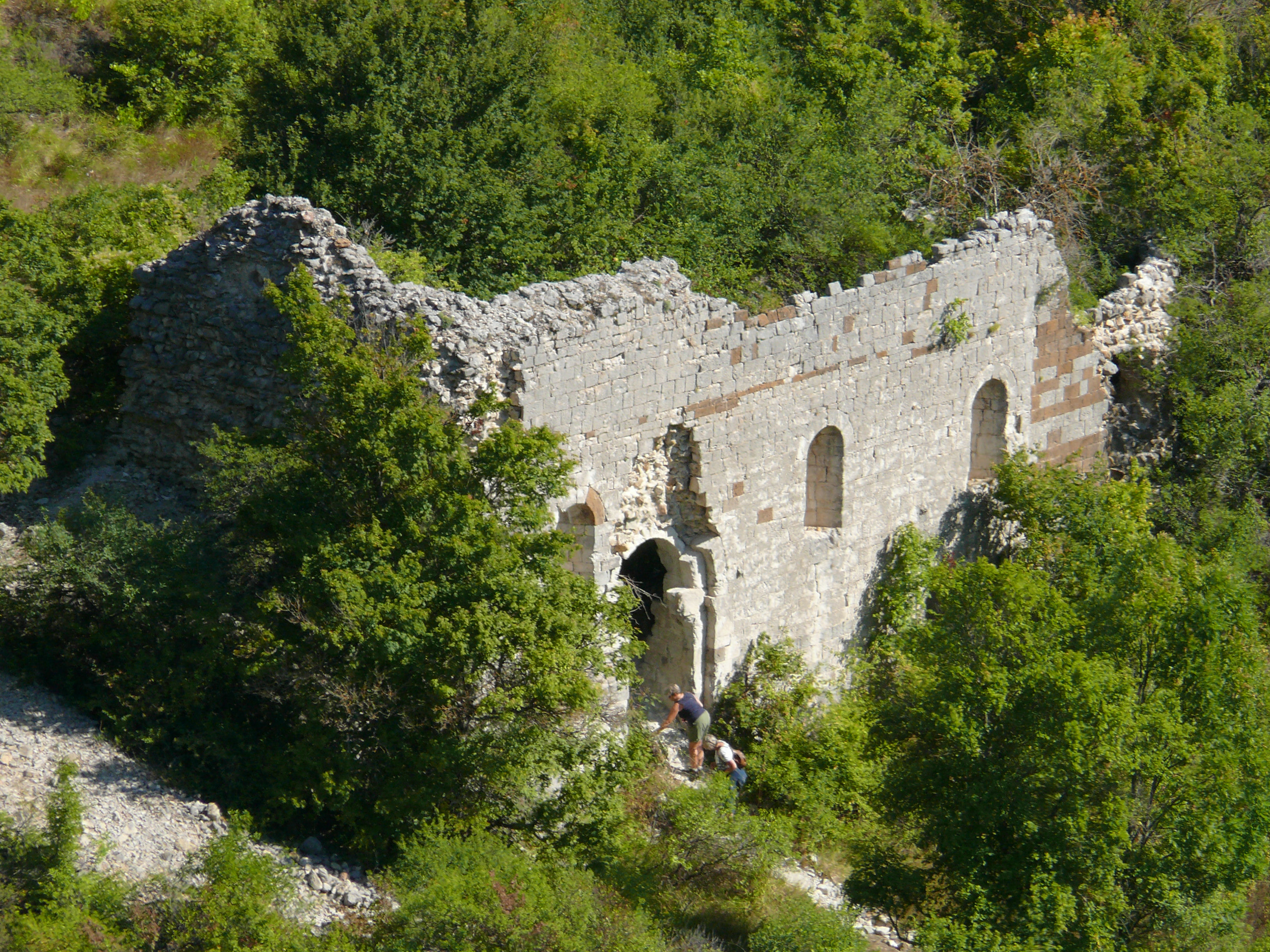 Castellane - Petra Castellana